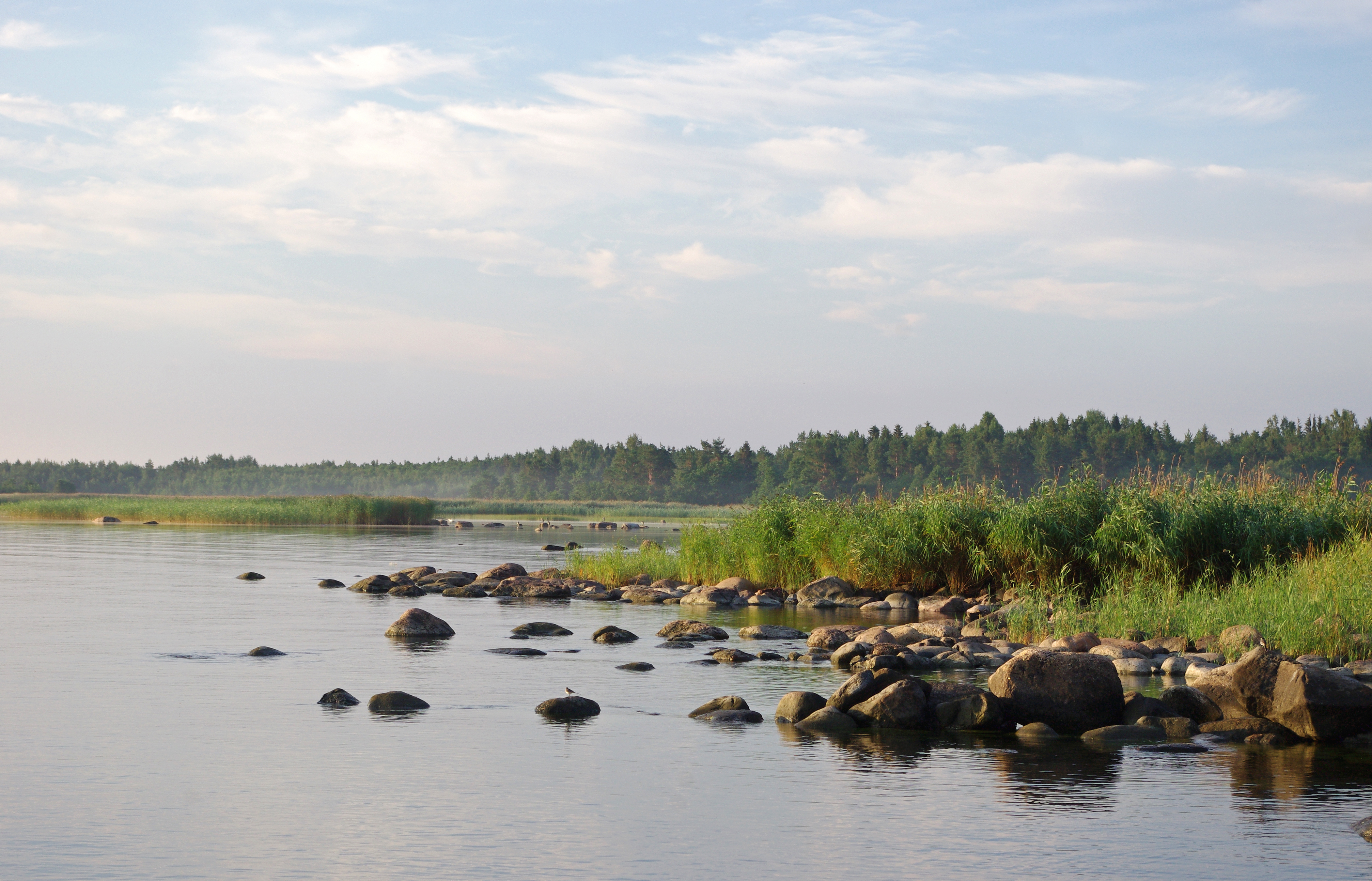 Hauaneeme lahe rand Pärispea külas